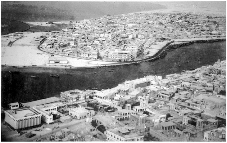 1960കളിലെ ദുബായ്- ഒരു വിഹഗ വീക്ഷണം.